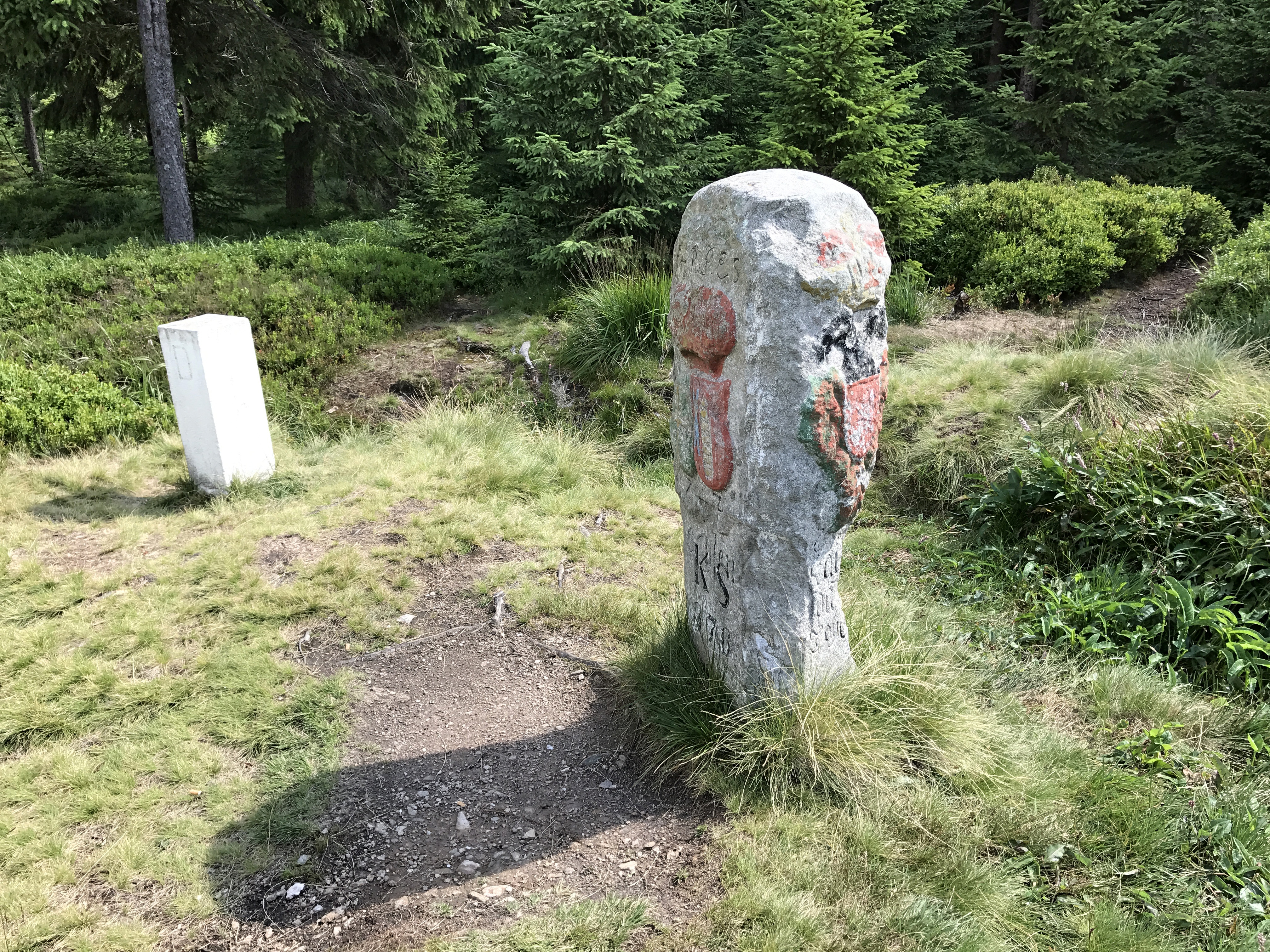 Boží Dar, trojmezný historický hraniční kámen